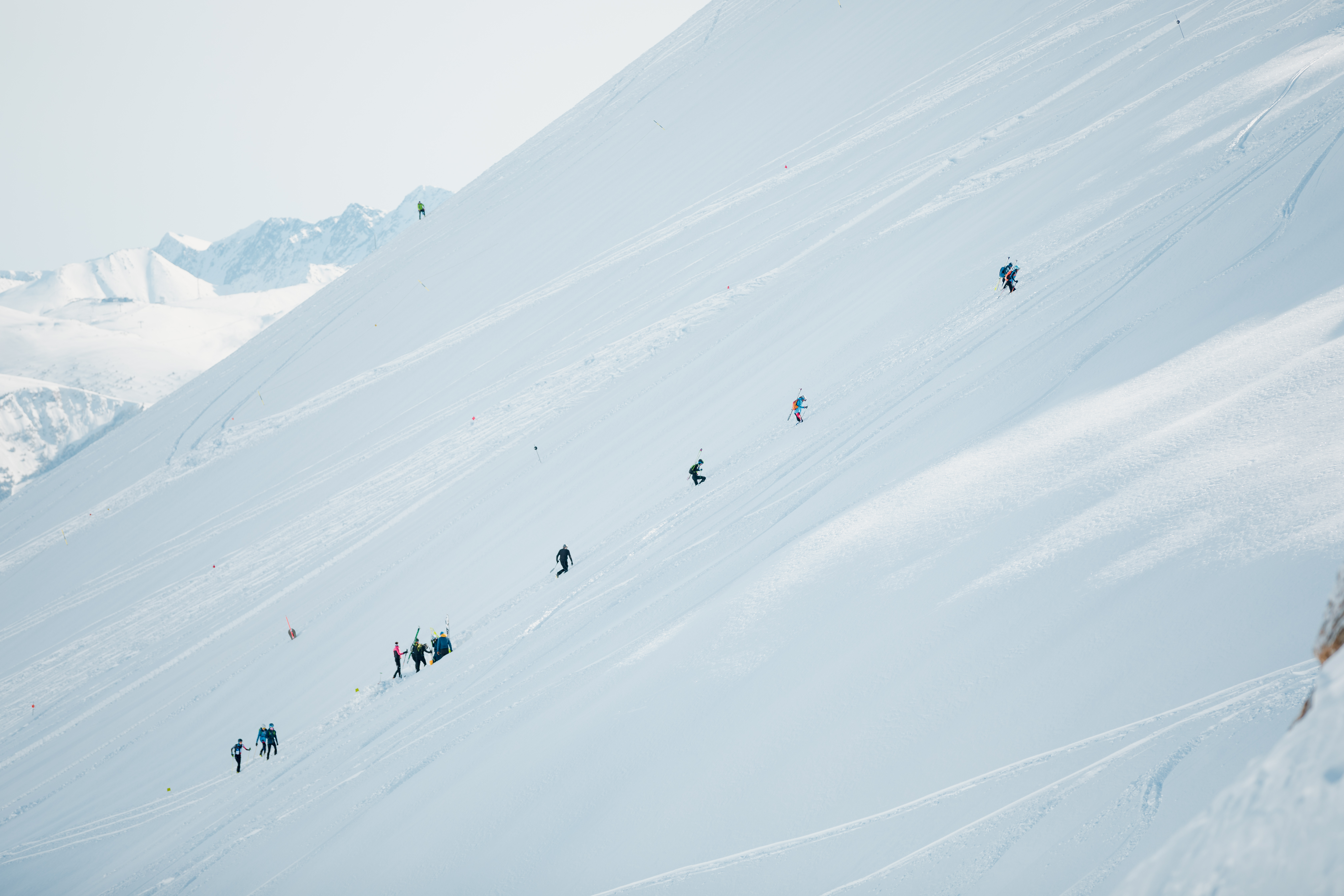 Esquí de Montaña en Pal Arinsal. Copa del Mundo Comapedrosa Andorra